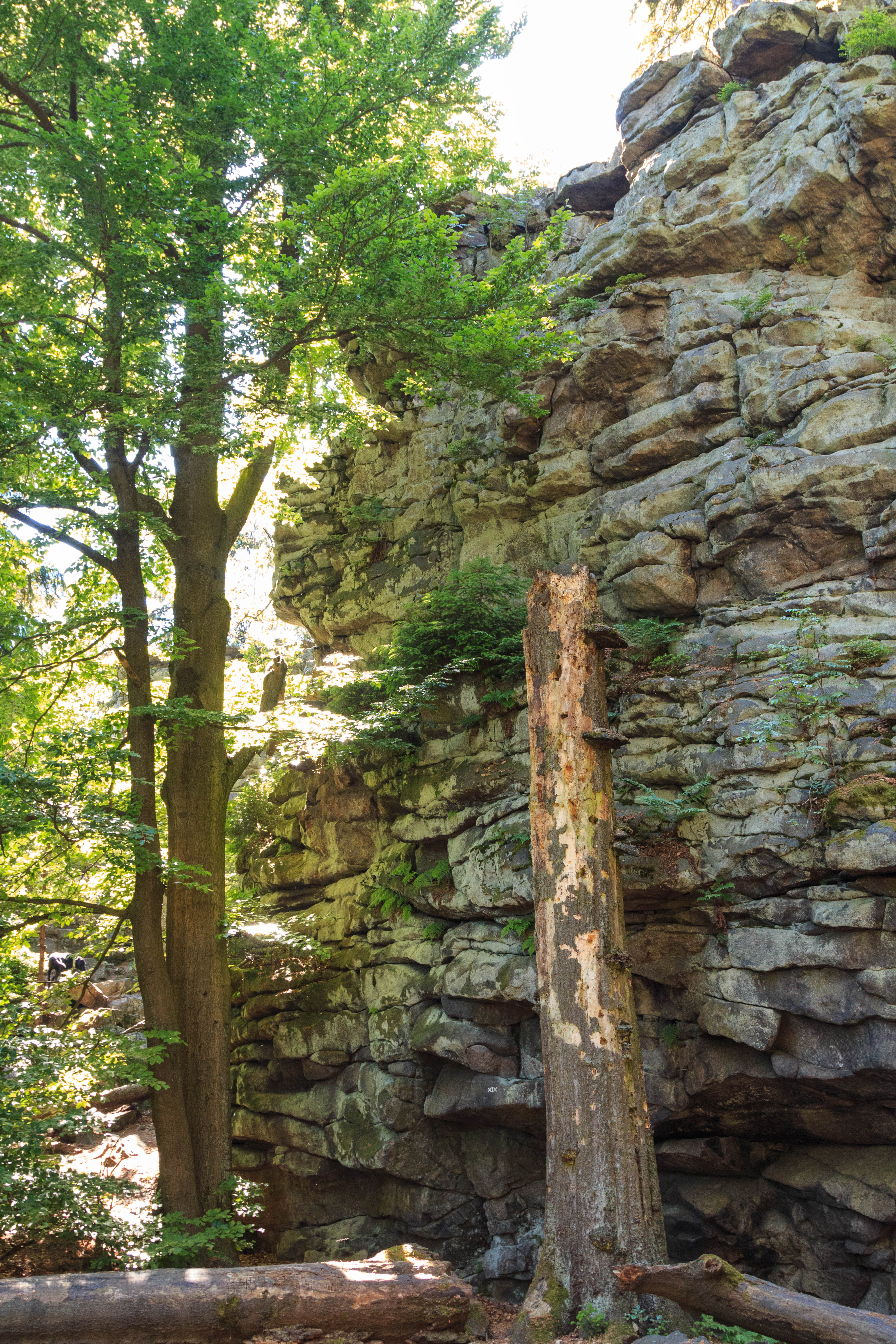 PP Lisovská skála Project: Chráněná území.